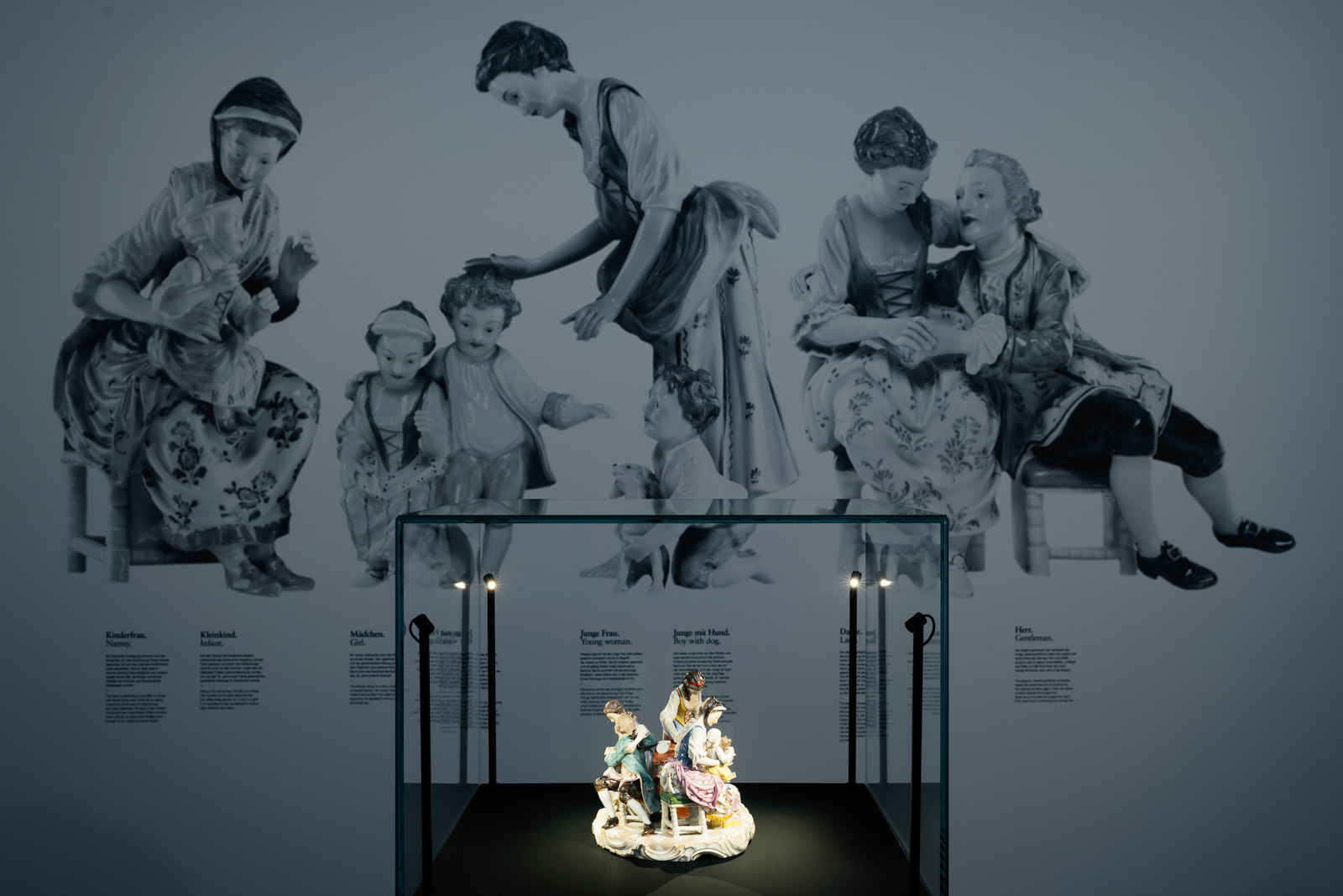 Figurengruppe: Von Langen-Kabinett mit der Kaffeegesellschaft